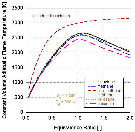 Efectos de disociación en la temperatura de la flama adiabatíca